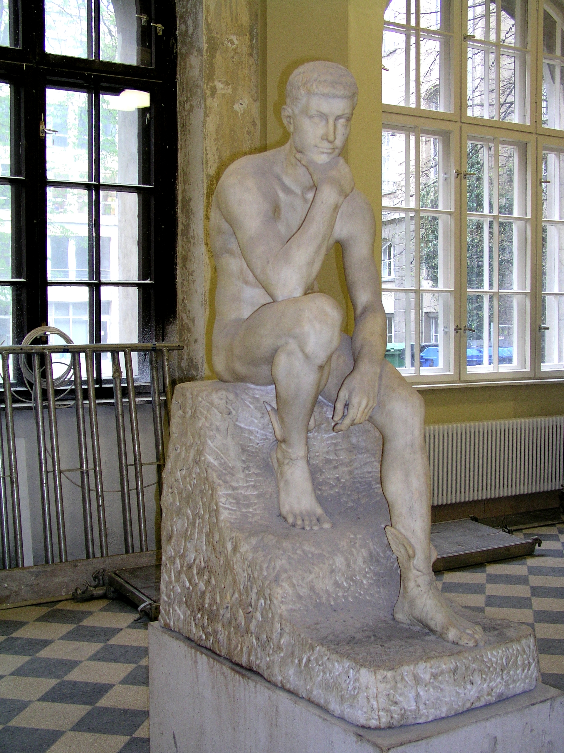 Marmorne Merkur-Plastik des Bildhauers Fritz Klimsch, die von dem Berliner Bürger Hermann Frenkel für die „Handelshochschule Berlin“ im Jahr 1907 gestiftet wurde, heute vor dem Eingang zur Kapelle